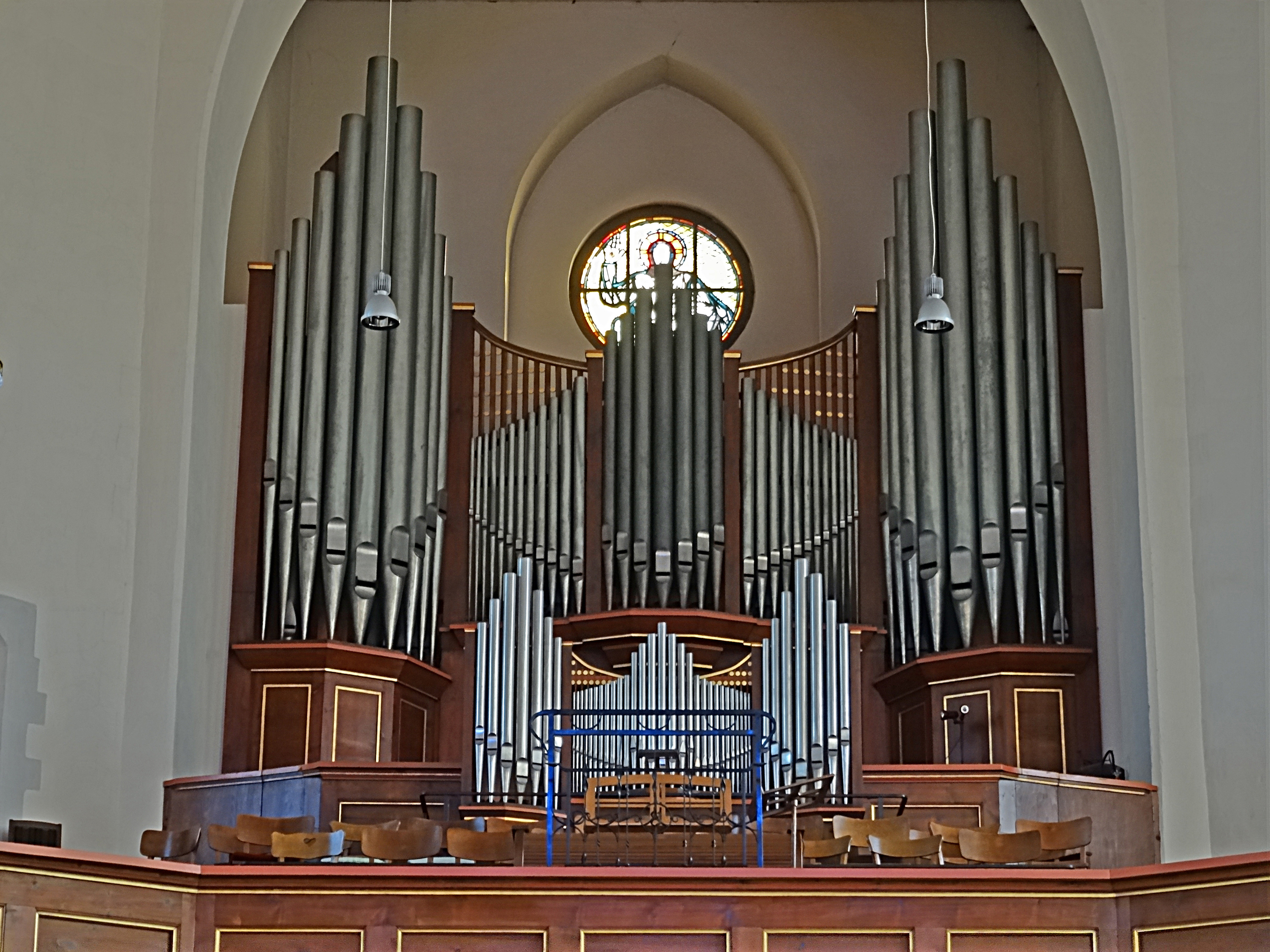 Orgel von Alexander Schuke (1950) in der Thomaskirche (Erfurt)[1]